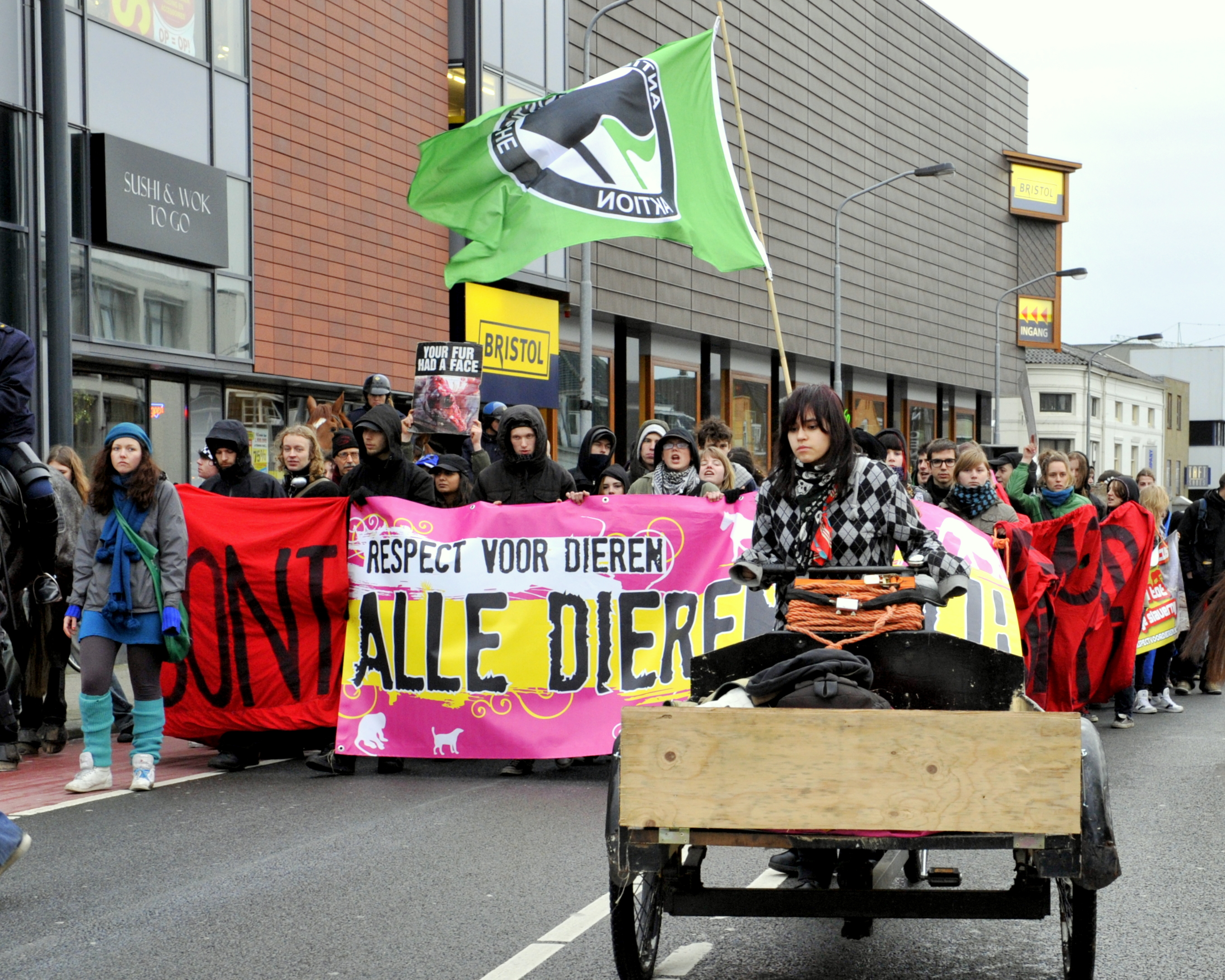 Zaandam, 20 Dec 2008